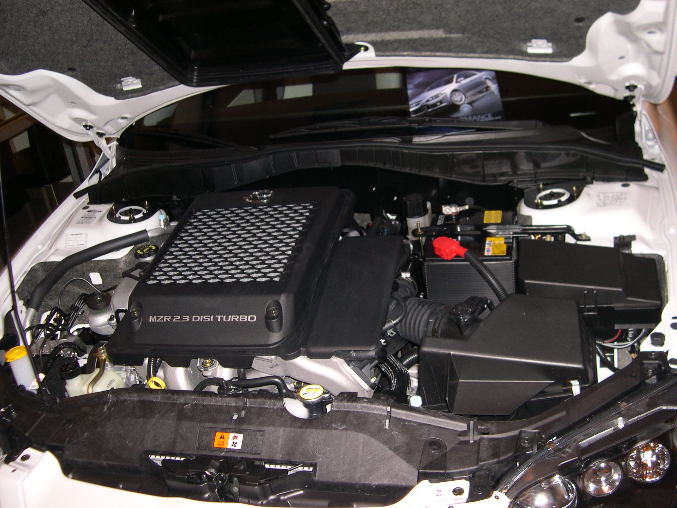 2006 Mazdaspeed 6 MZR turbo engine